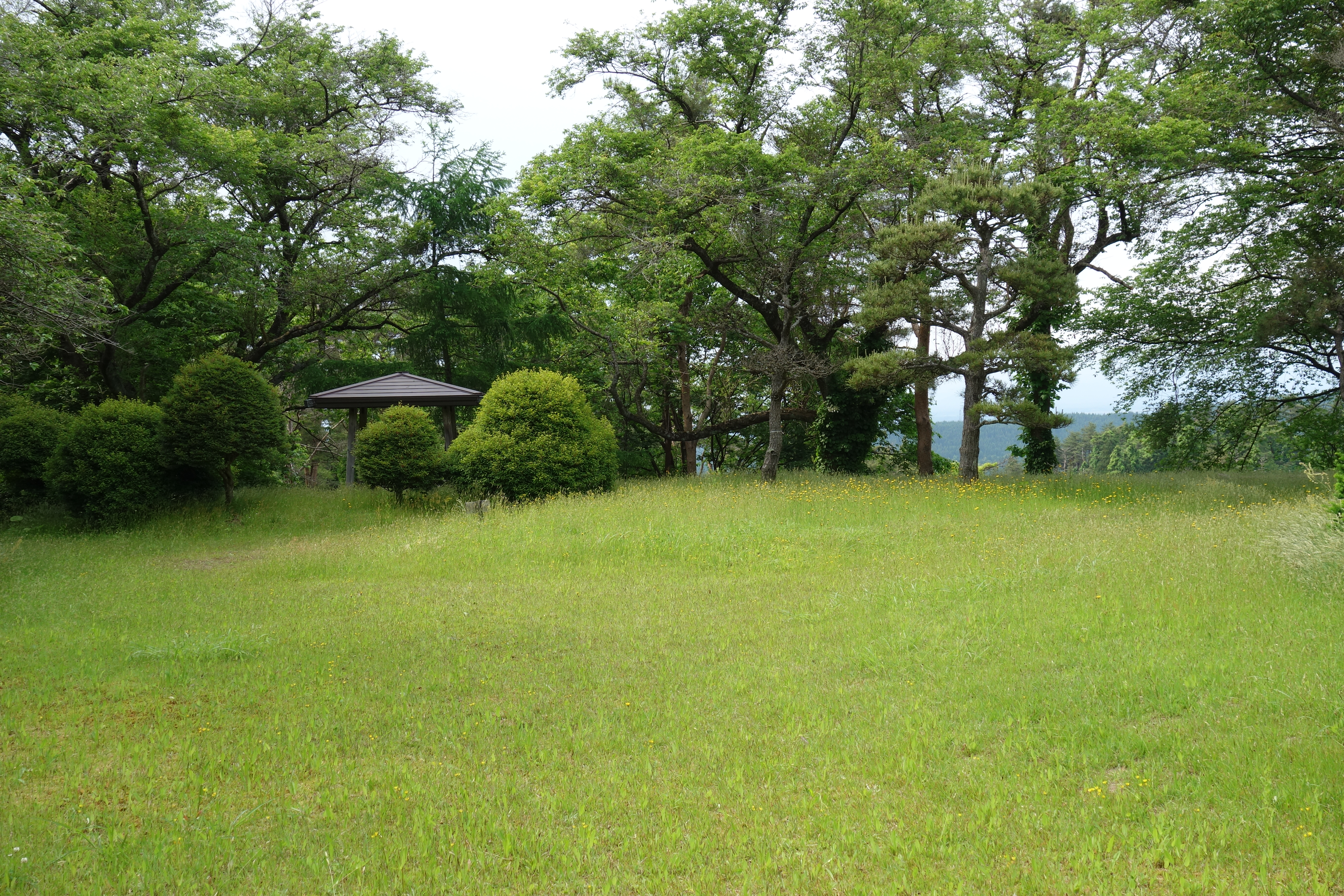 檜山安東氏城館跡 本丸跡